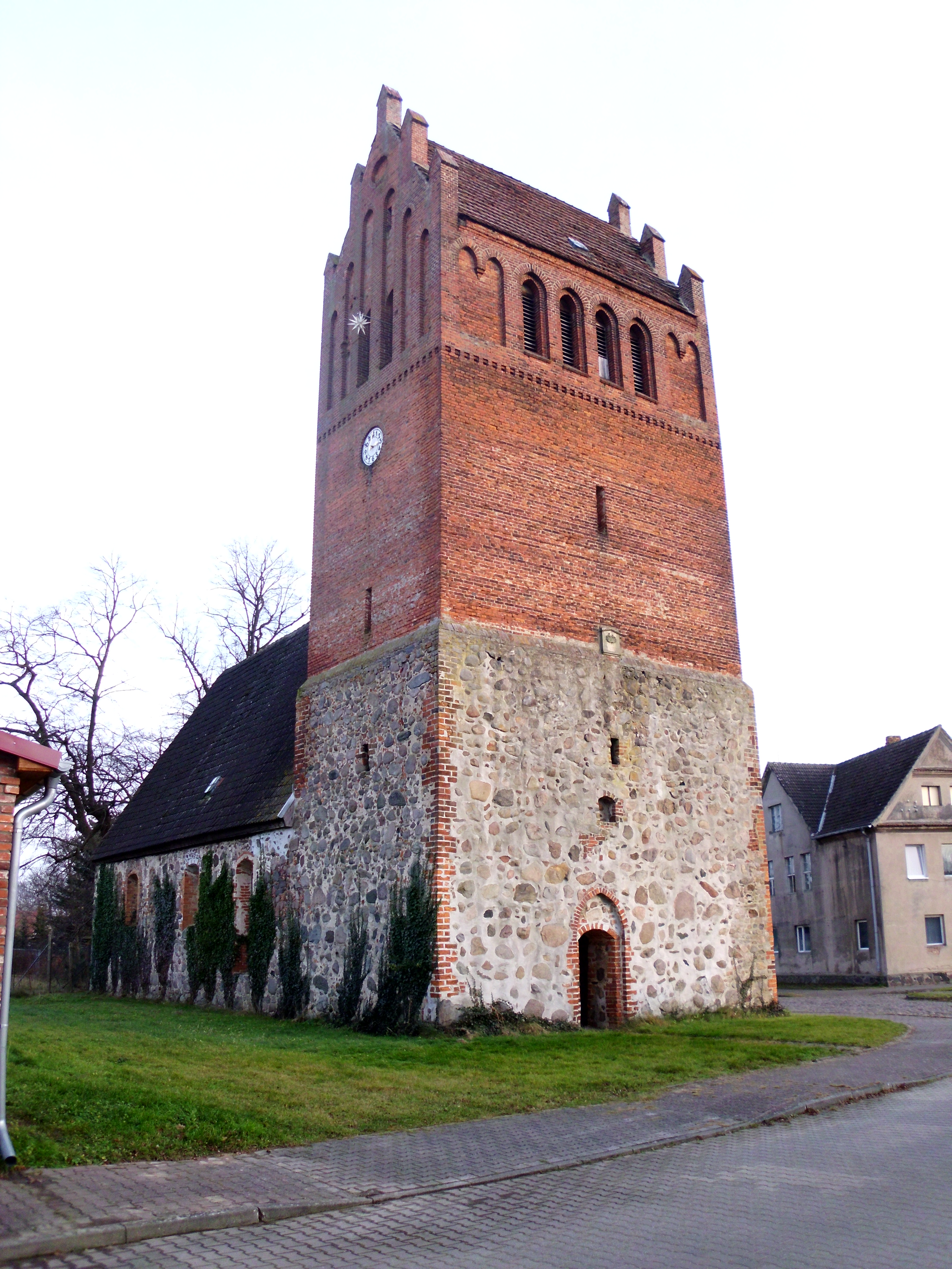 denkmalgeschützte Dorfkirche in Demerthin, Gemeinde Gumtow